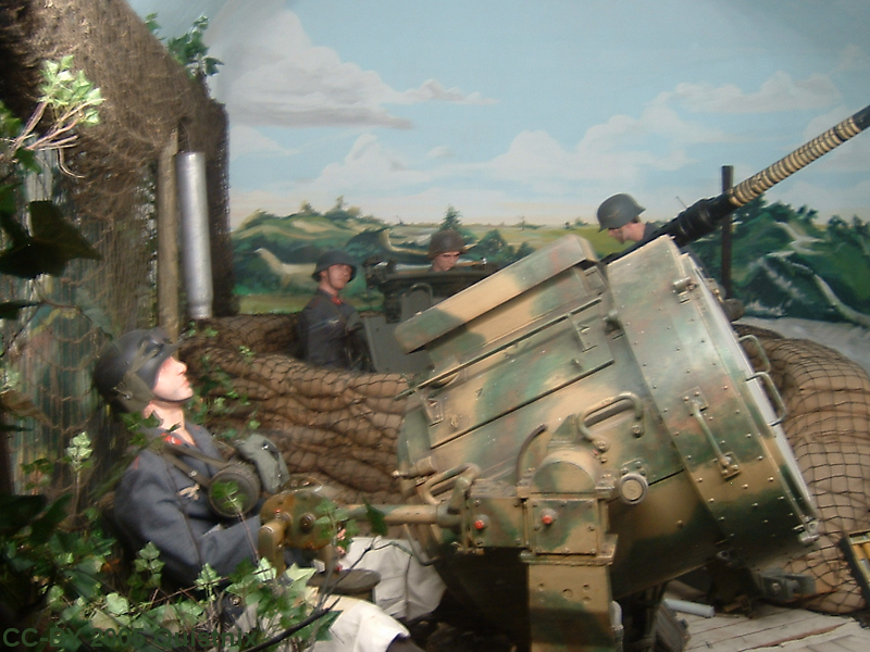 Duits luchtafweergeschut, diorama in Fort Hoek van Holland